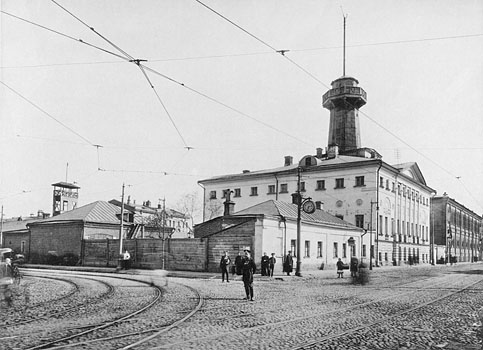 205. Пятницкiй полицейскiй домъ на Пятницкой ул.